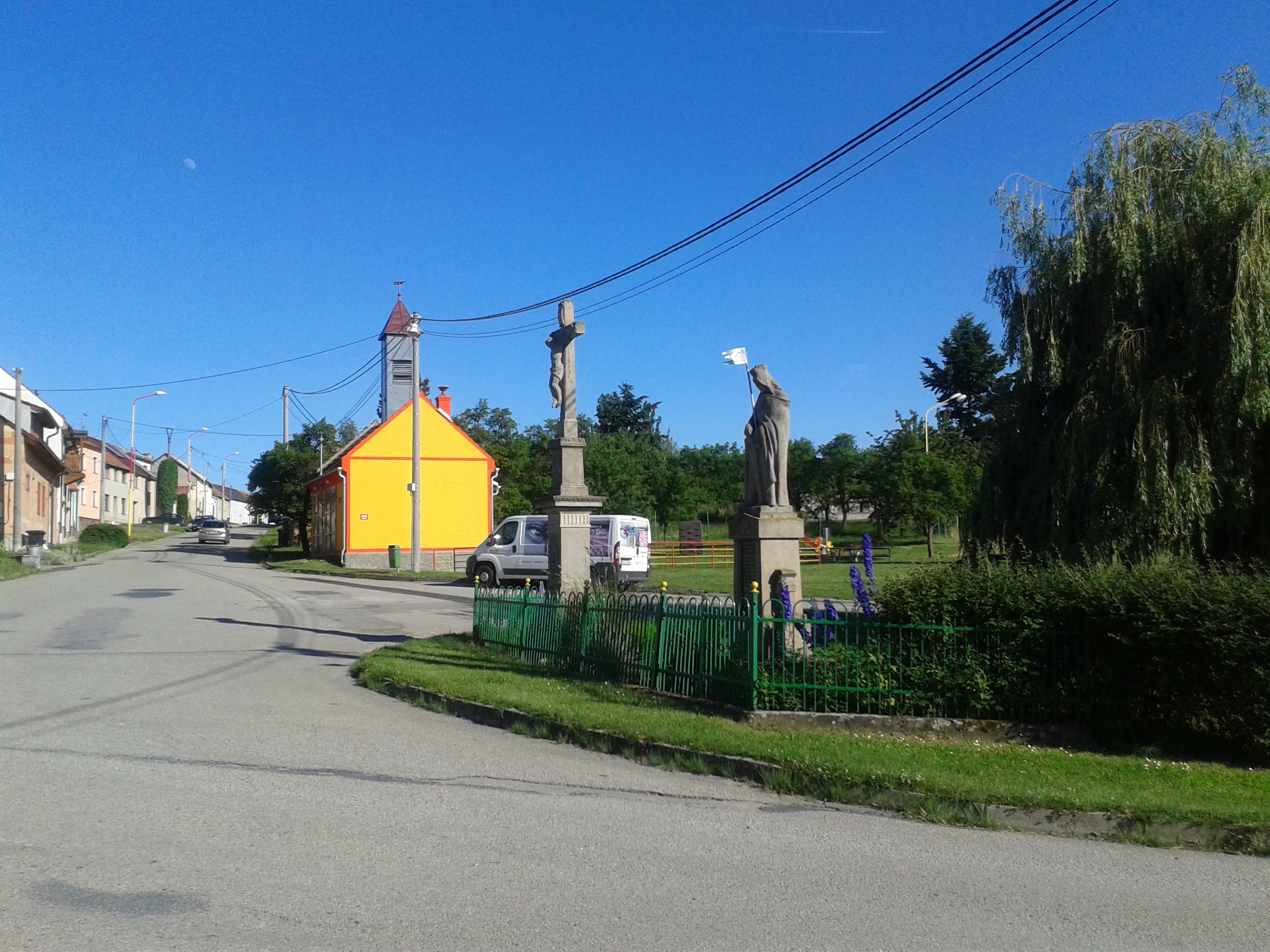 Náves Zelená Hora